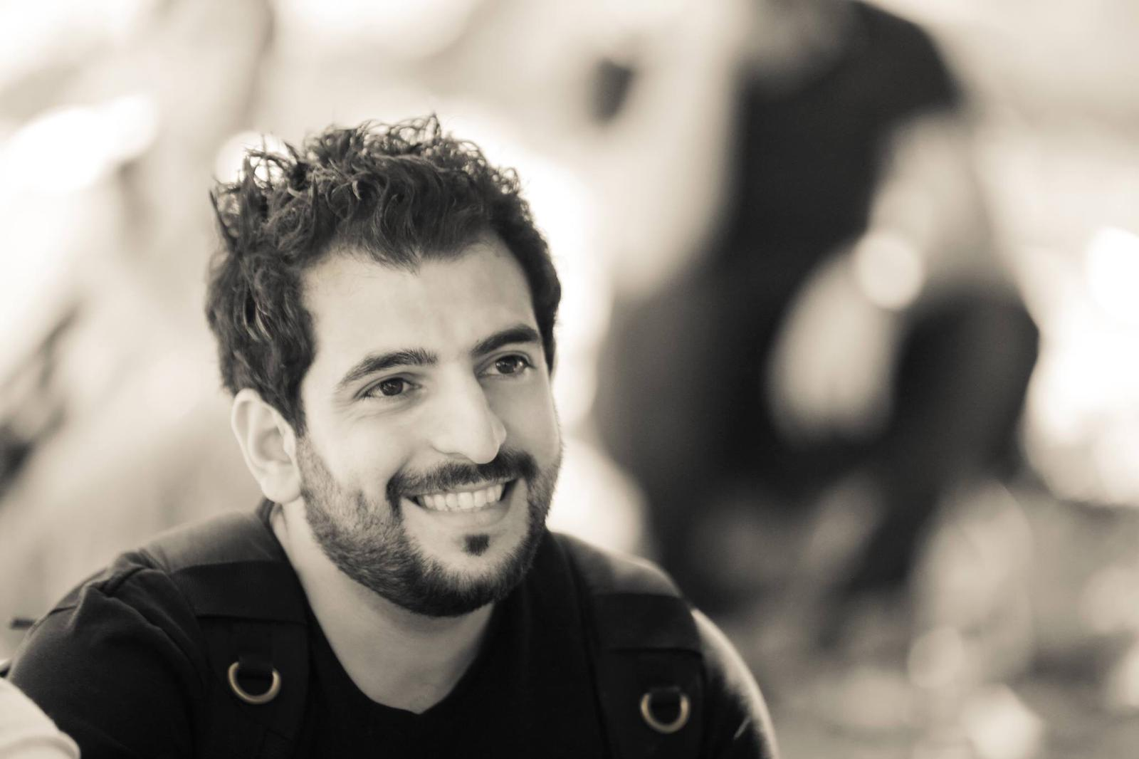 صورة طارق البكري